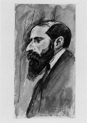 Portrait Martin Buber, 1916